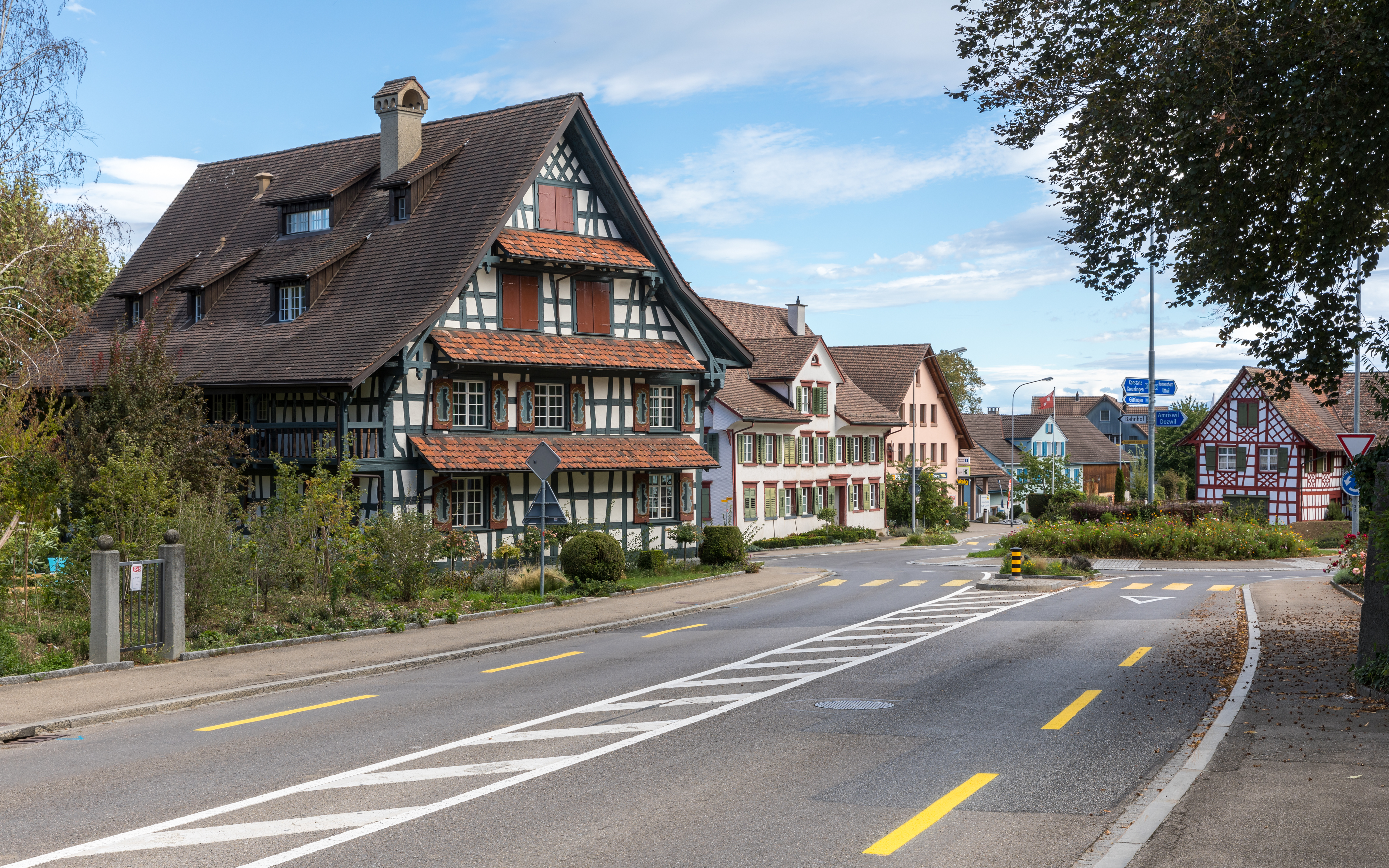 Kesswil TG: Westliche Ortseinfahrt mit zentralem Kreisel. Links das ehemalige Gasthaus "Bären" und heutige Gemeindehaus.